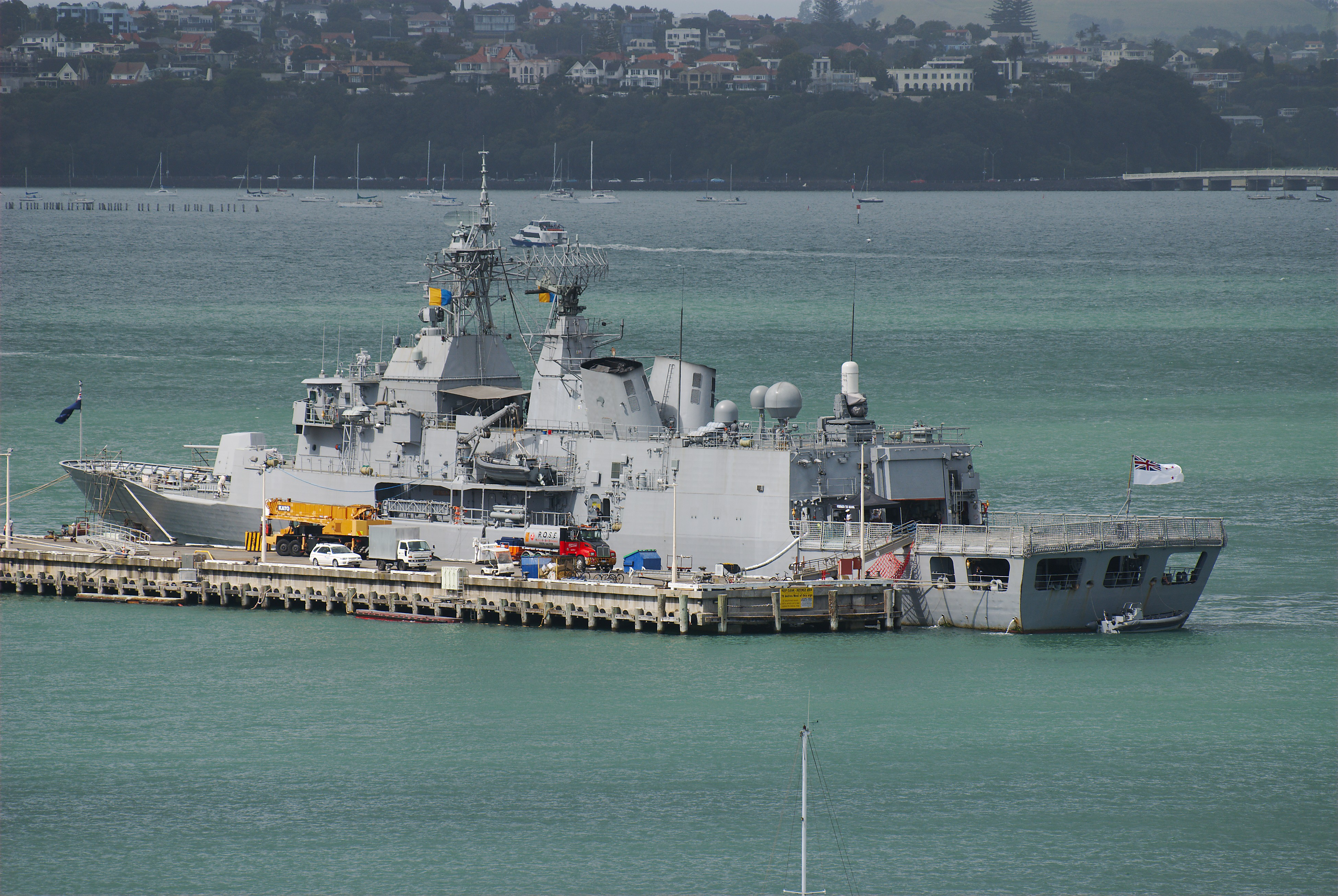 HMNZS Te Mana (F111) in Devonport